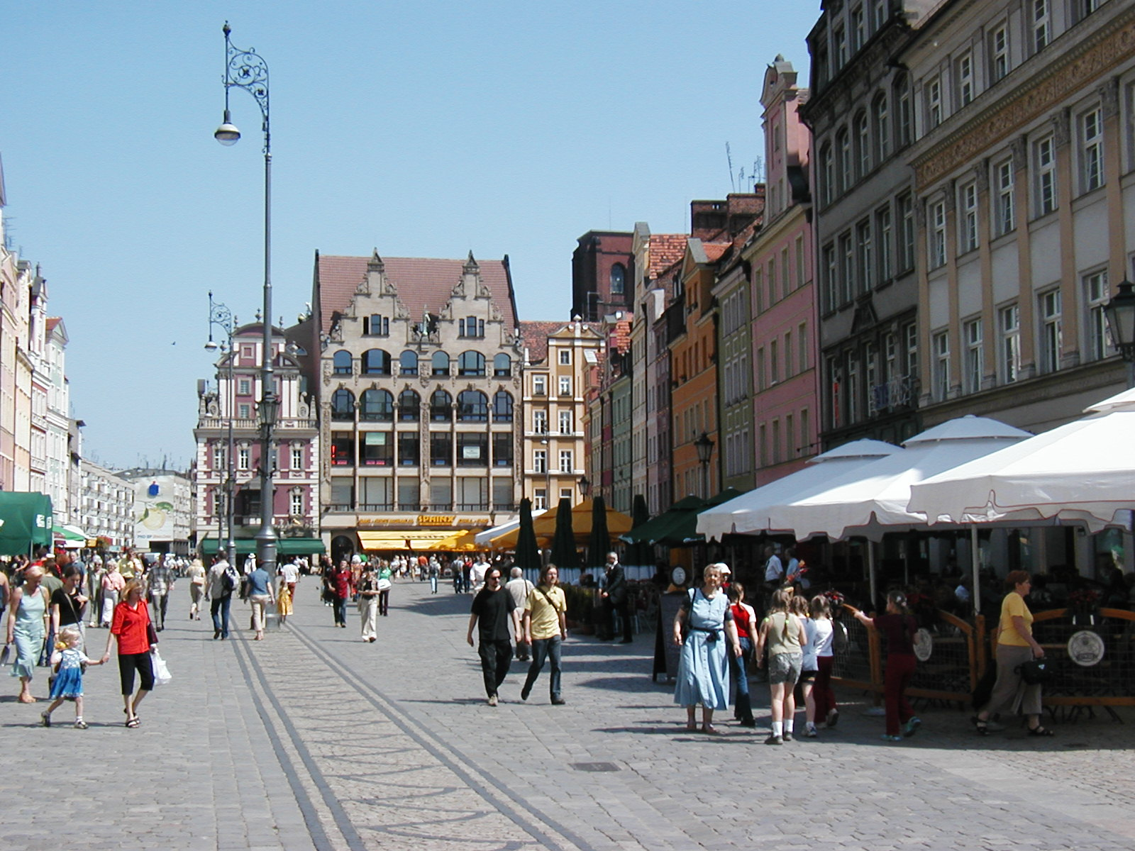 Rynek i Wroclaw